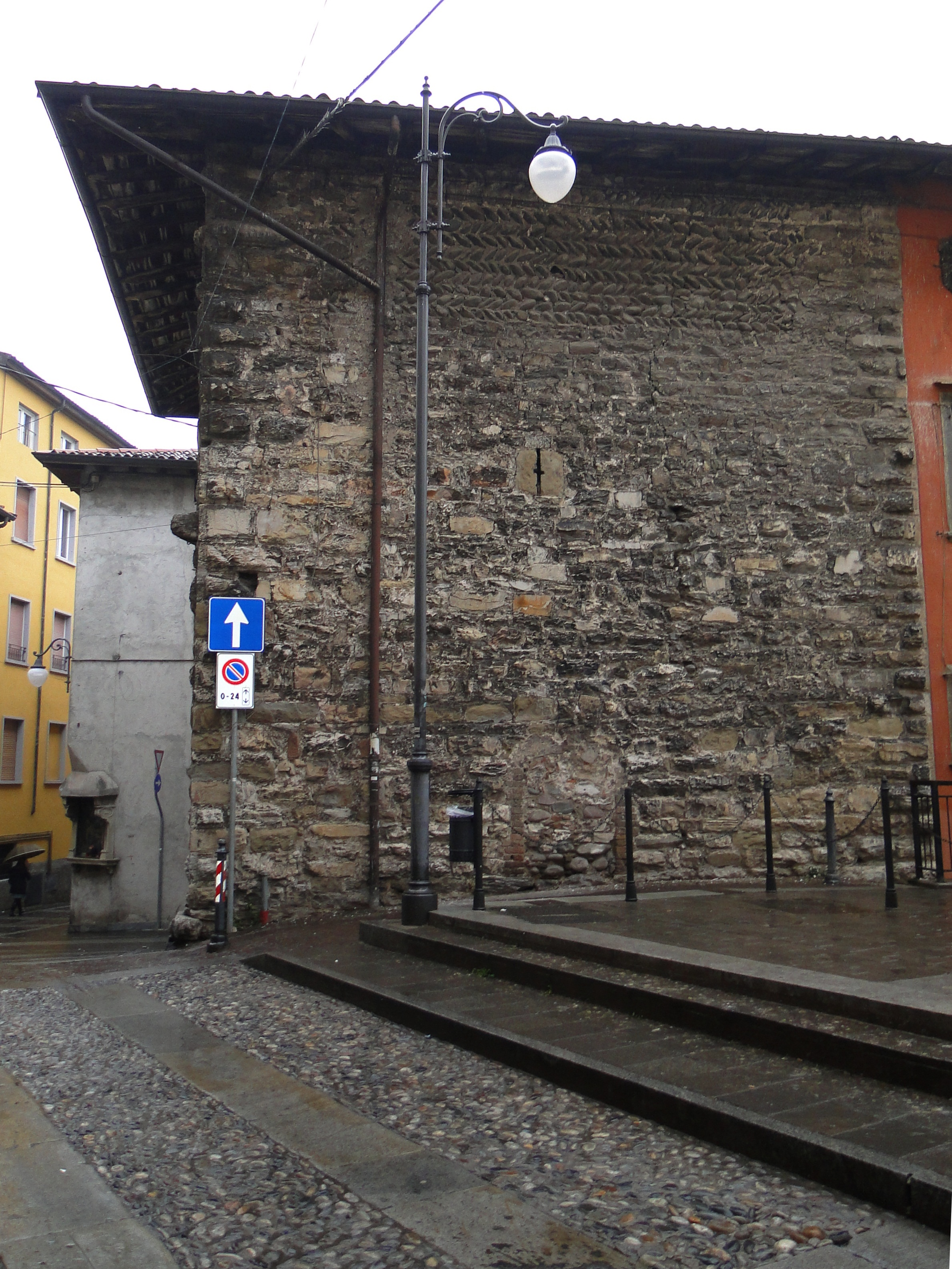 Alzano Lombardo (BG). La torre denominata "Torrazzo", risalente al XIV secolo